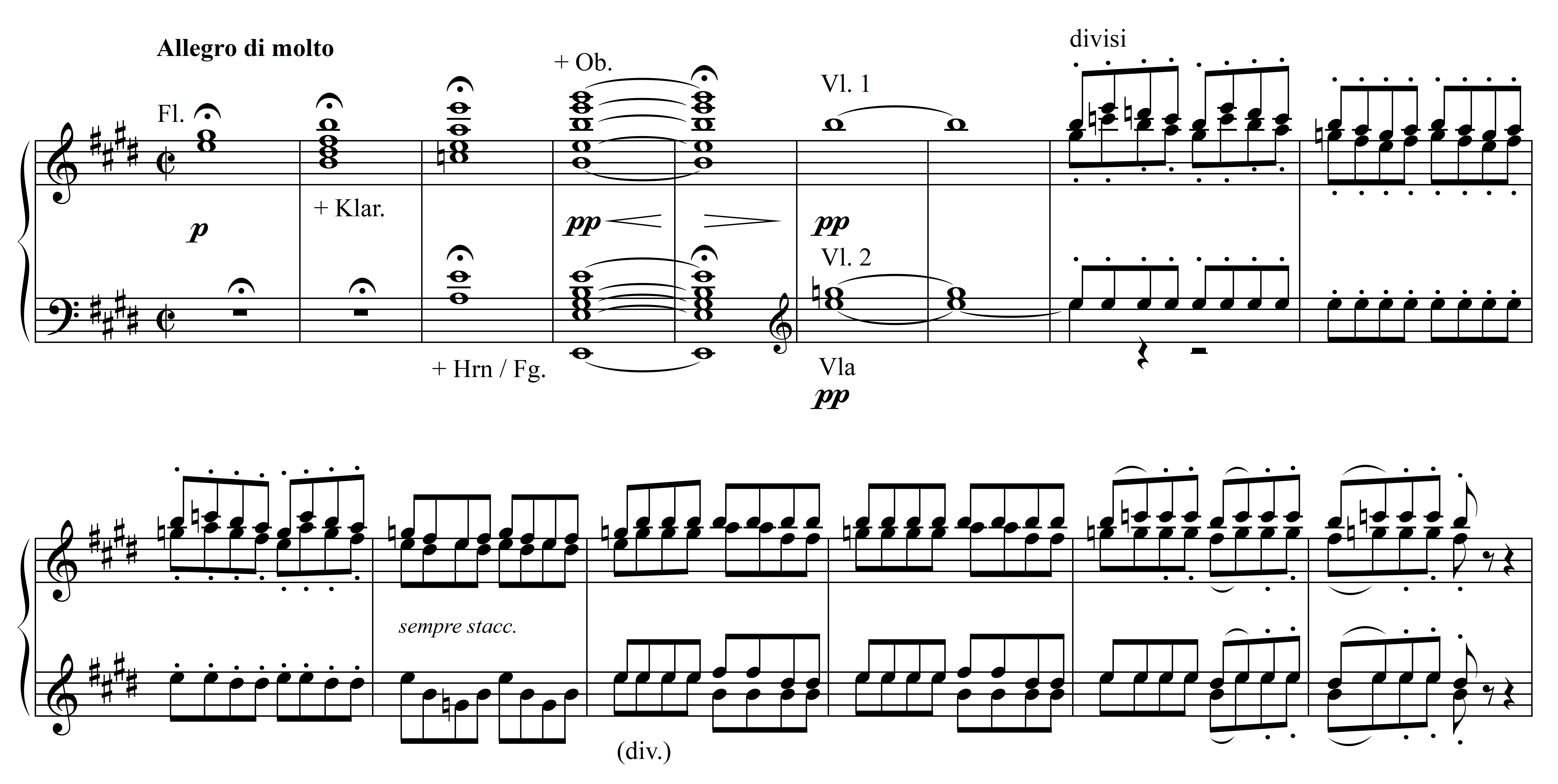 Notenbeispiel Mendelssohn - Sommernachtstraum, Ouvertüre (Orchester) T. 1-15